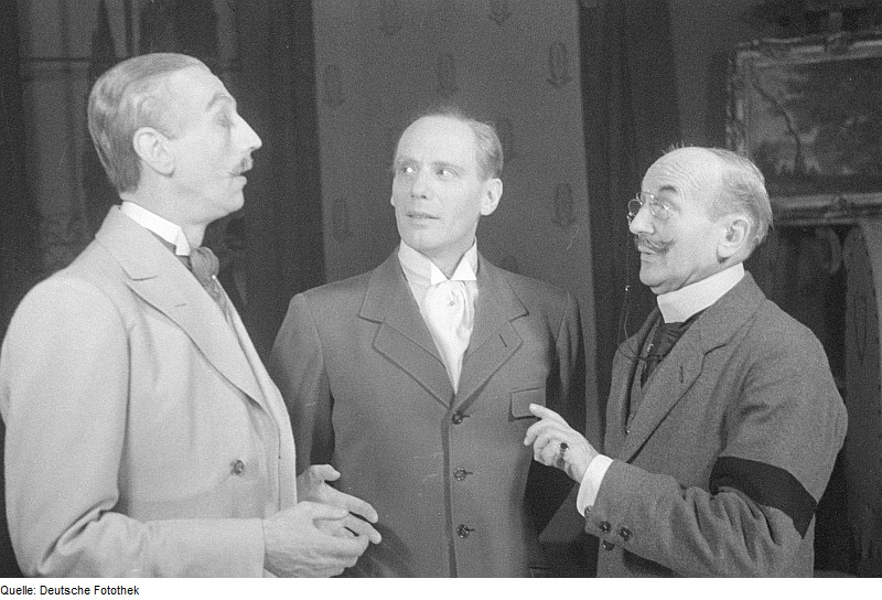 Original image description from the Deutsche Fotothek Szenenbilder